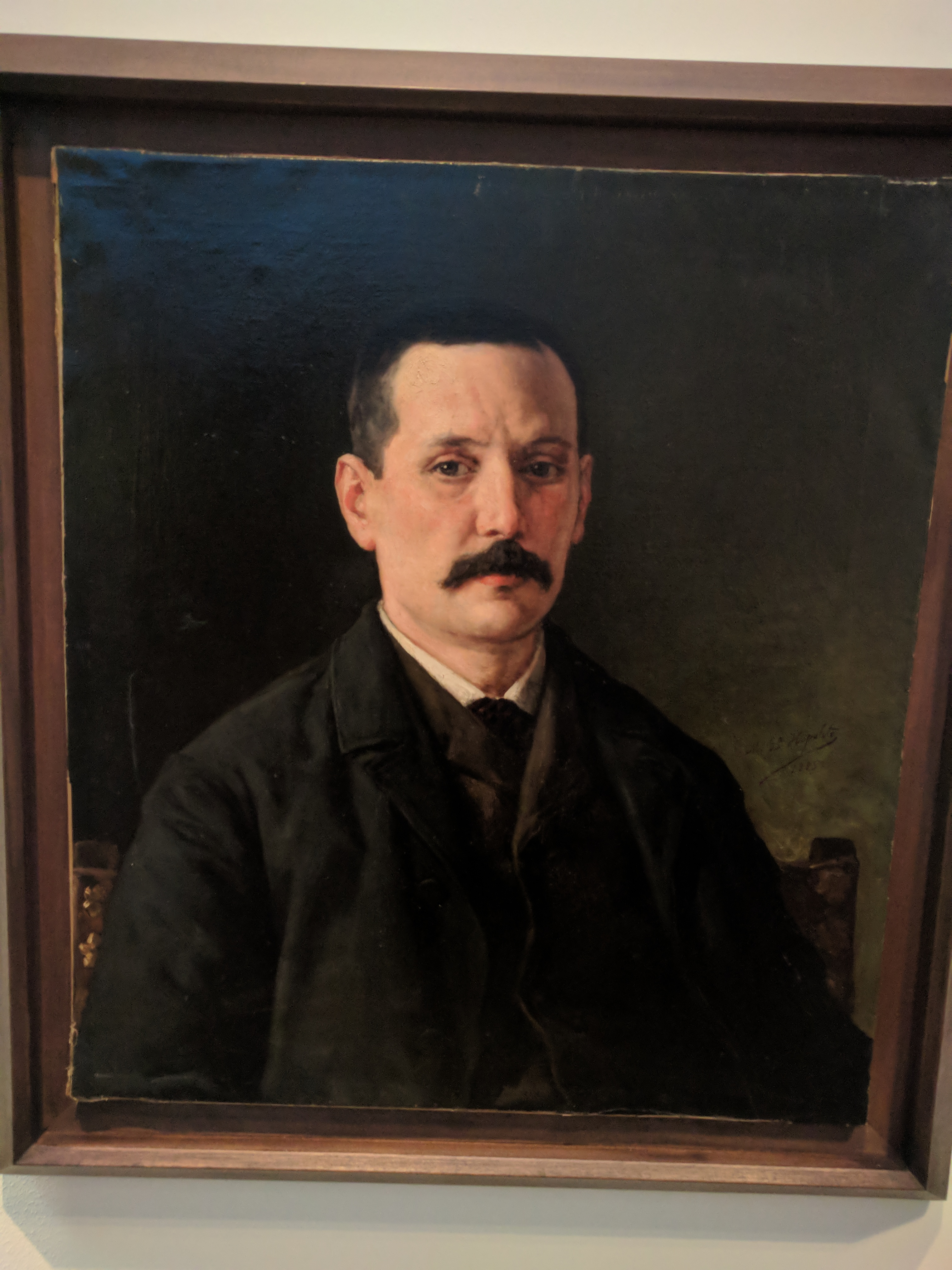 Retrato del escritor español Benito Pérez Galdós (1843-1920).